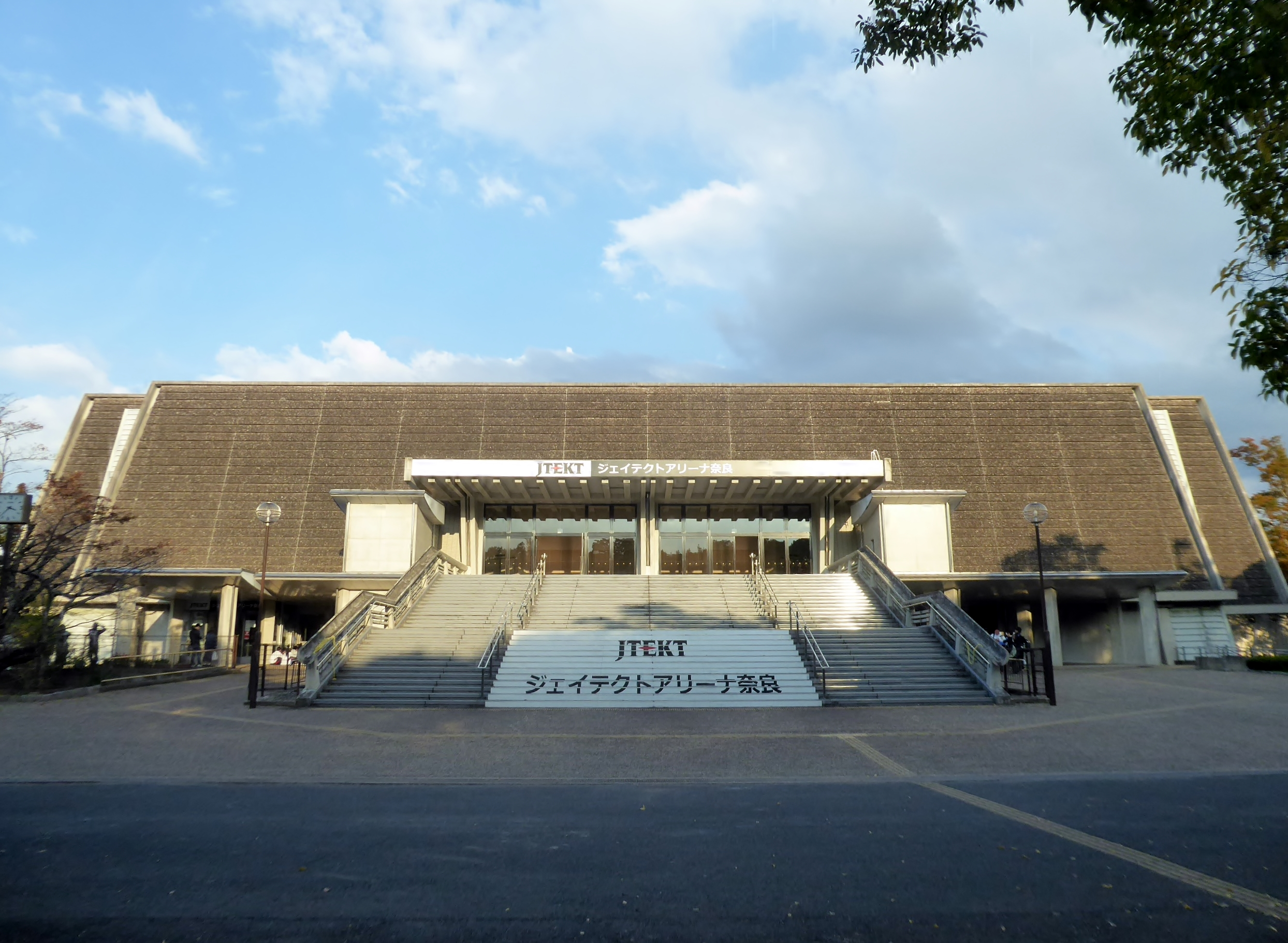 橿原公苑第一体育館を撮影。 Panasonic Lumix DMC-TZ60